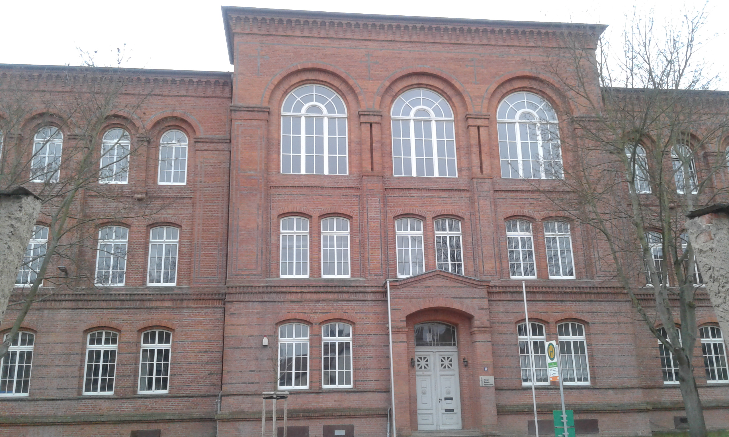 Schule